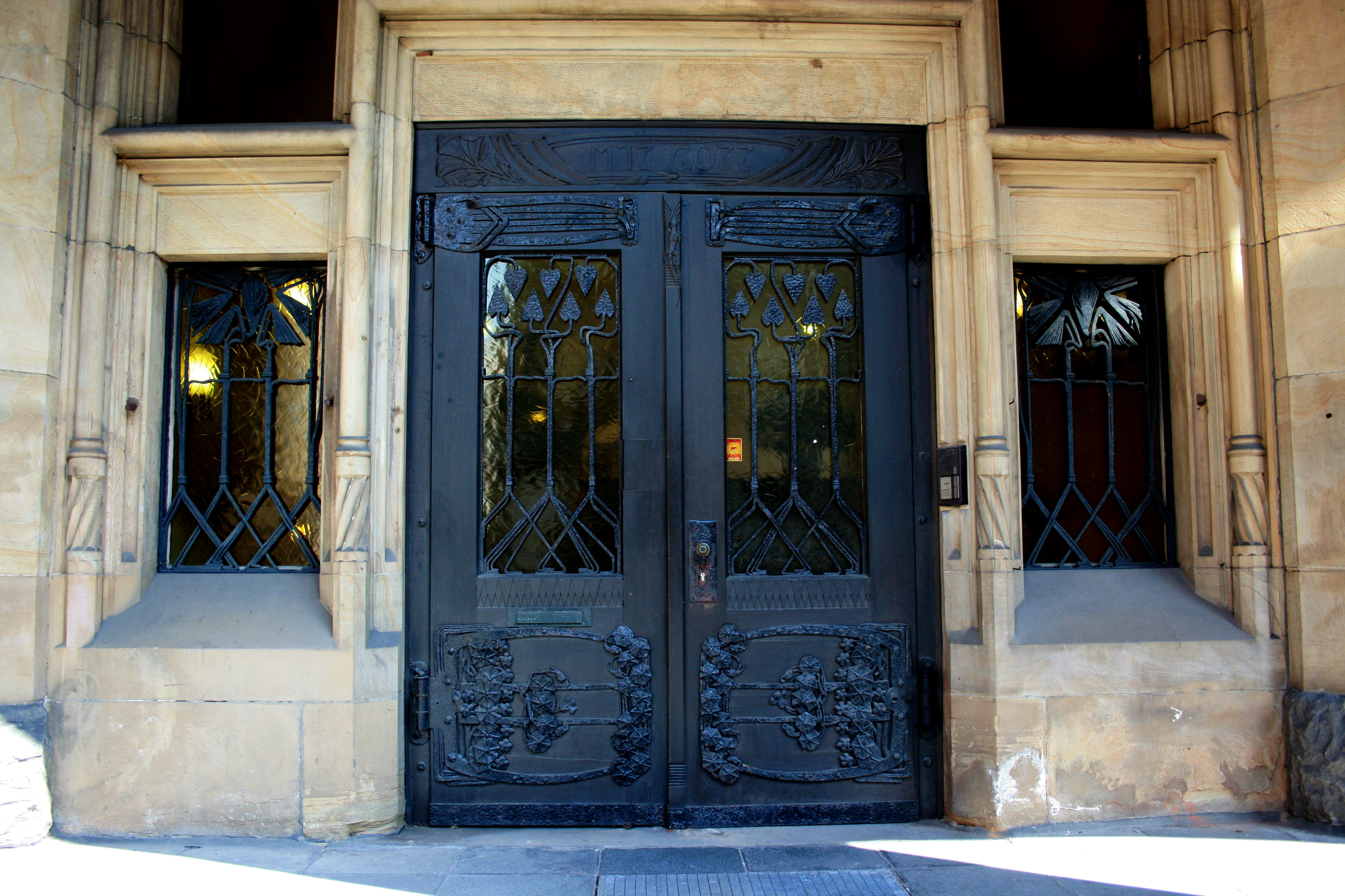 Gymnasium Sedanstraße in Wuppertal